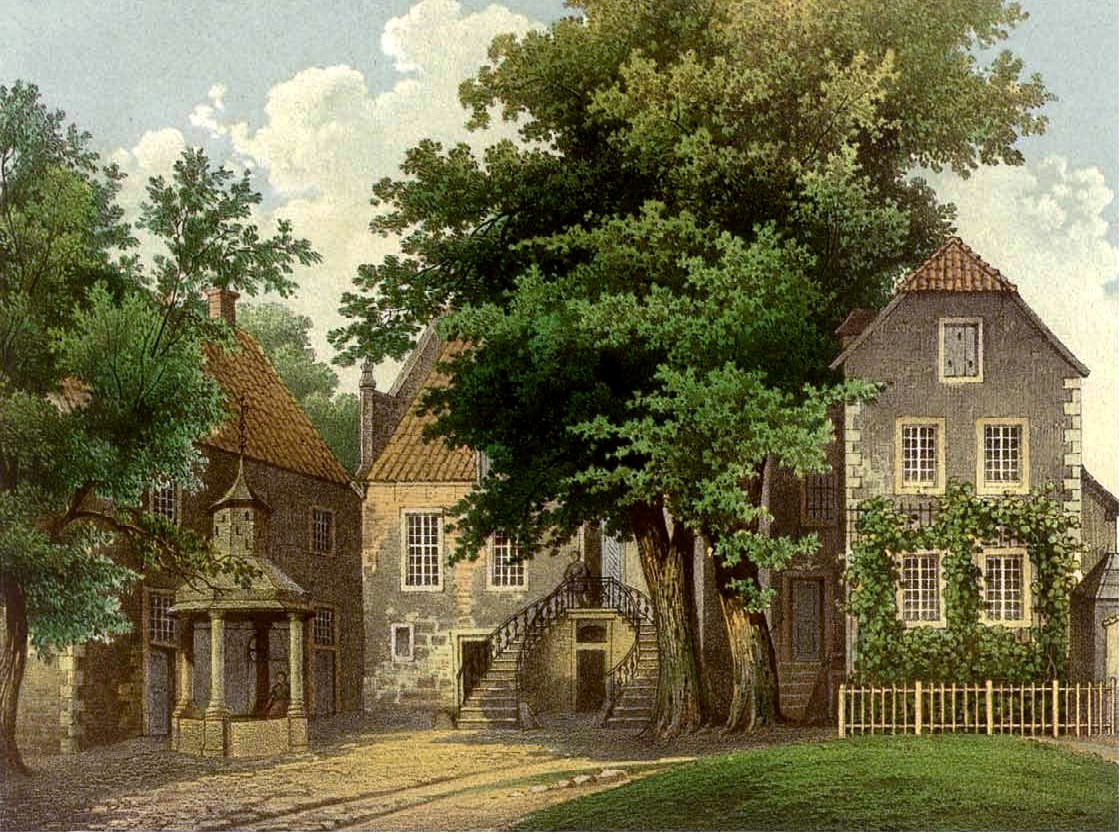 Rittergut Falkenhof, Kreis Steinfurt, Provinz Westphalen, Lithografie aus dem 19. Jahrhundert